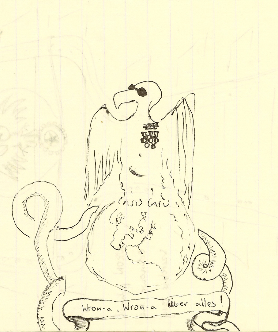 "WRONa, WRONa uber alles" - karykatura z czasu stanu wojennego, rys. Maciej Miezian